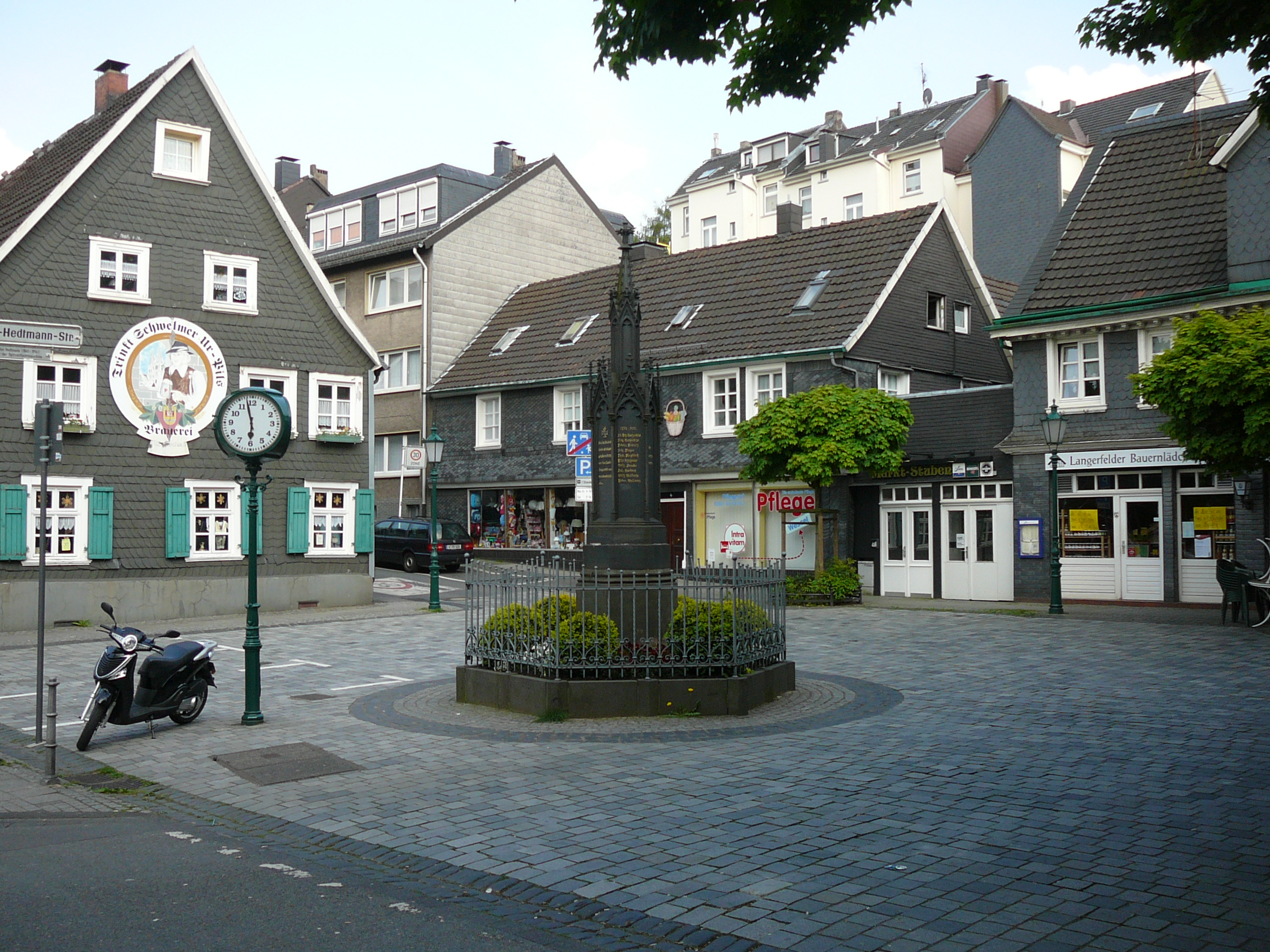 Langerfelder Straße, Wuppertal